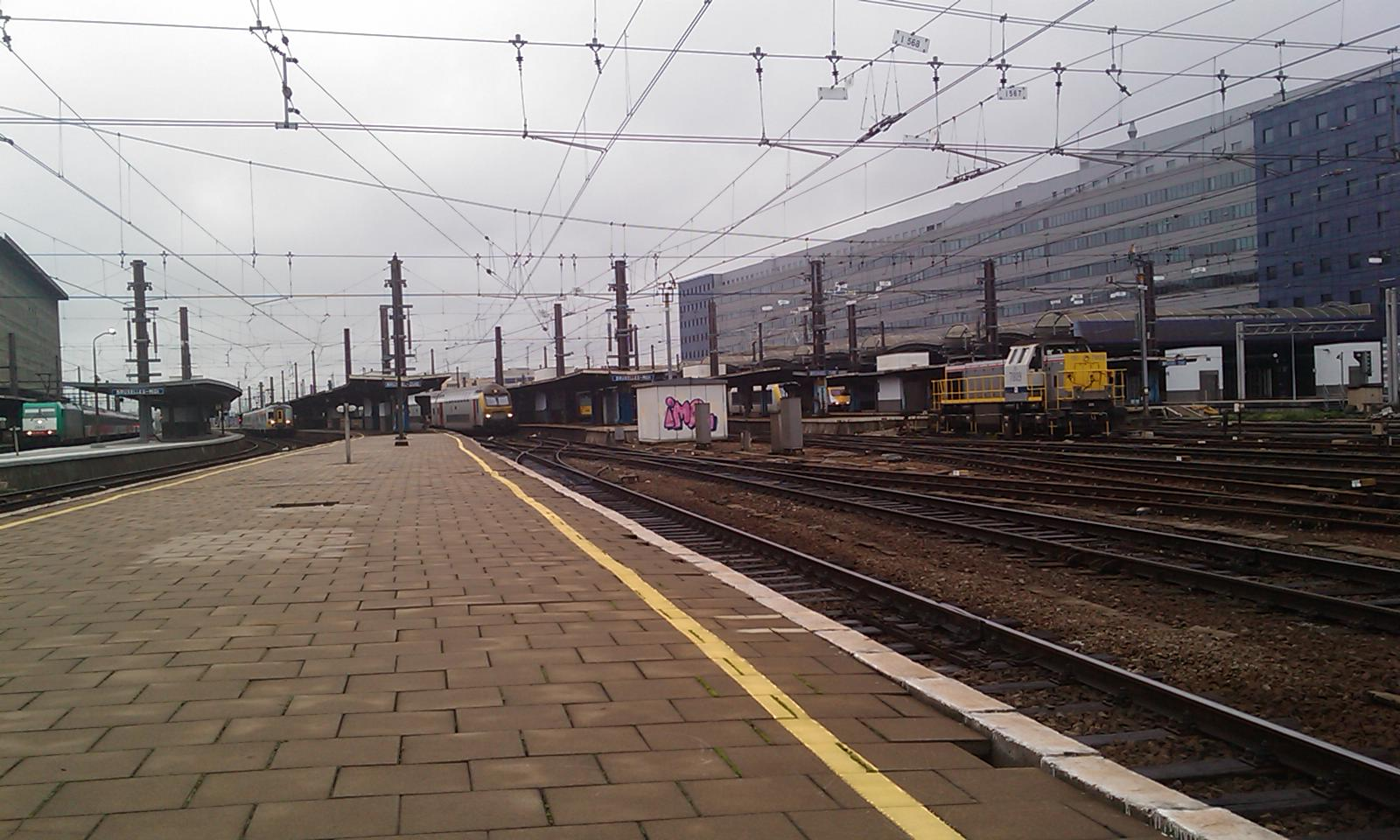 Gare de Bruxelles-Midi - Station Brussel-Zuid